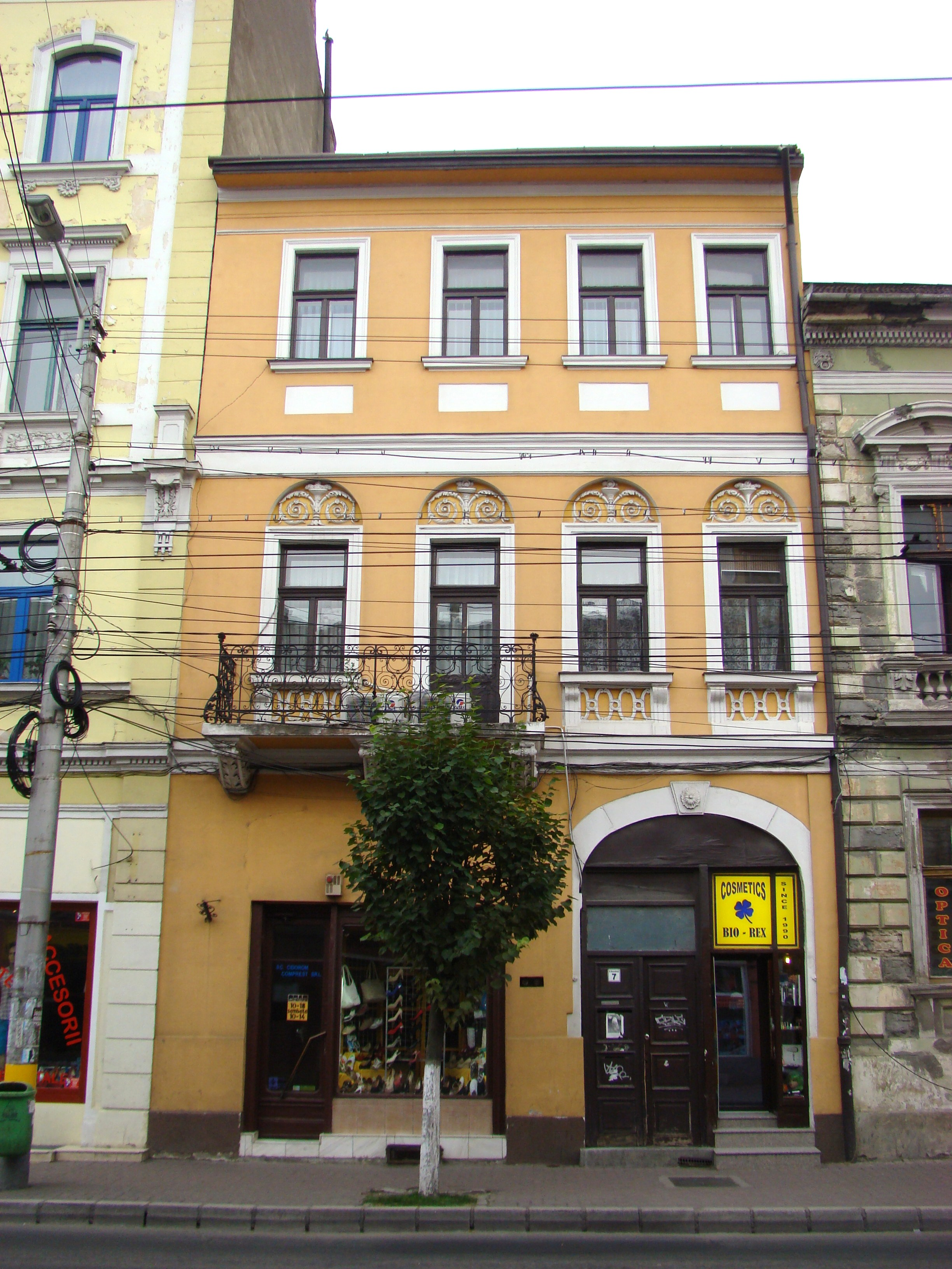 Clădire monument istoric, str. Memorandumului, nr.7